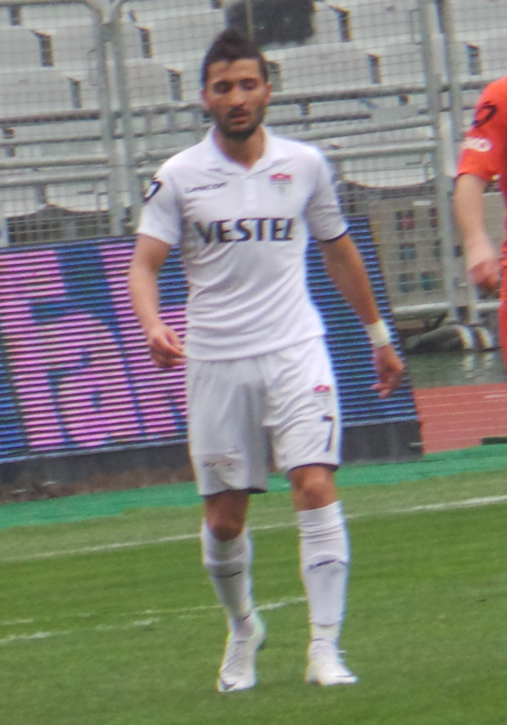 Murat Gürbüzerol